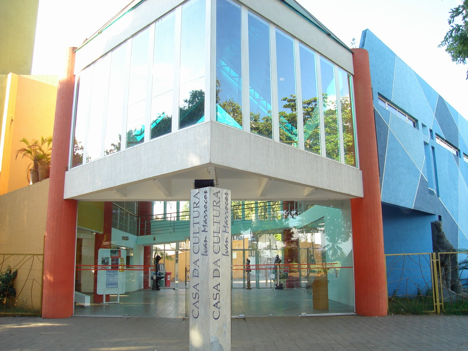 Casa da Cultura Ivan Marrocos, Porto Velho, Rondônia, Brasil - The House of Culture at Porto Velho, Rondônia, Brazil